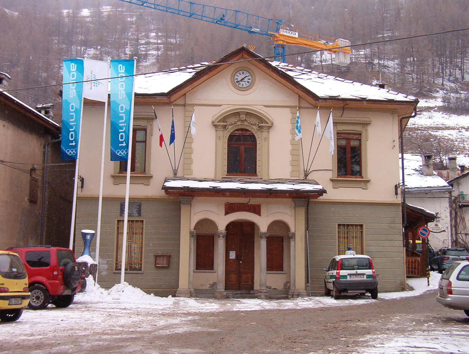 Municipio Pragelato - provincia di Torino - Italy